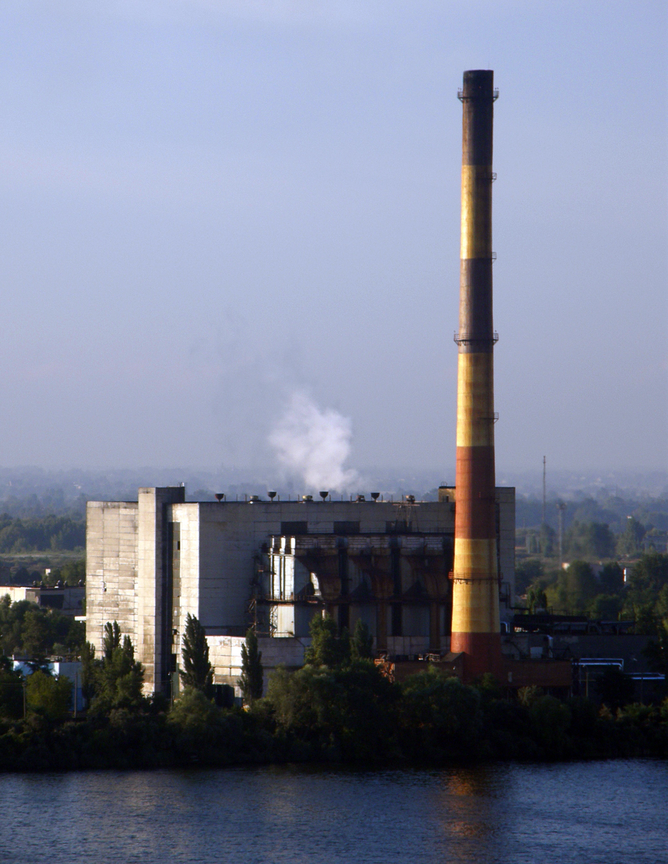 мусоросжигательный завод «Энергия»